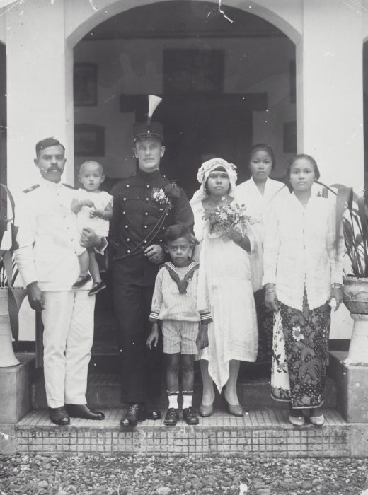 Foto. Het huwelijk van een KNIL-sergeant met een Indische vrouw